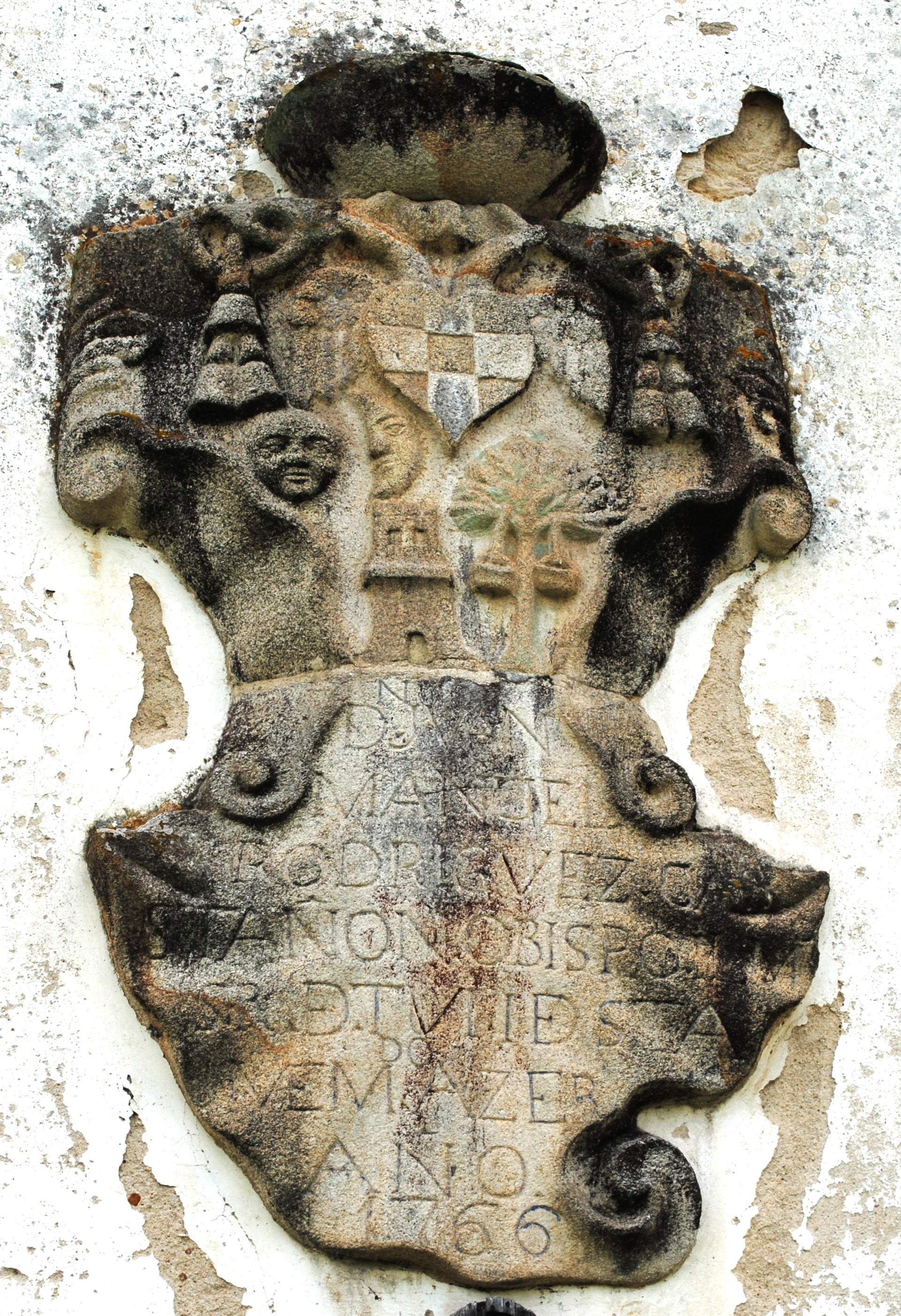 Dn JVAN MANOEL RODRIGVEZ CASTAÑON OBISPO ILMO SR DE TVI I DESTA VE Mdo AZER AÑO 1766. Escudo do bispo Juan Manuel Rodríguez Castañón (1752–1769) na ábsida da igrexa parroquial de San Lourenzo de Oliveira, Ponteareas.